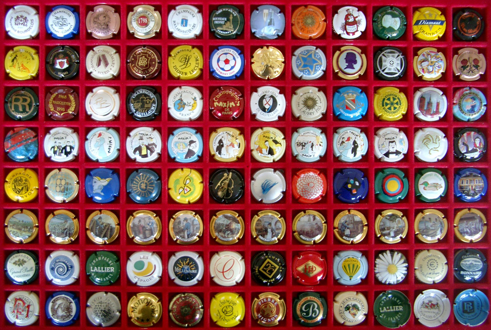 A collector's champagne capsules